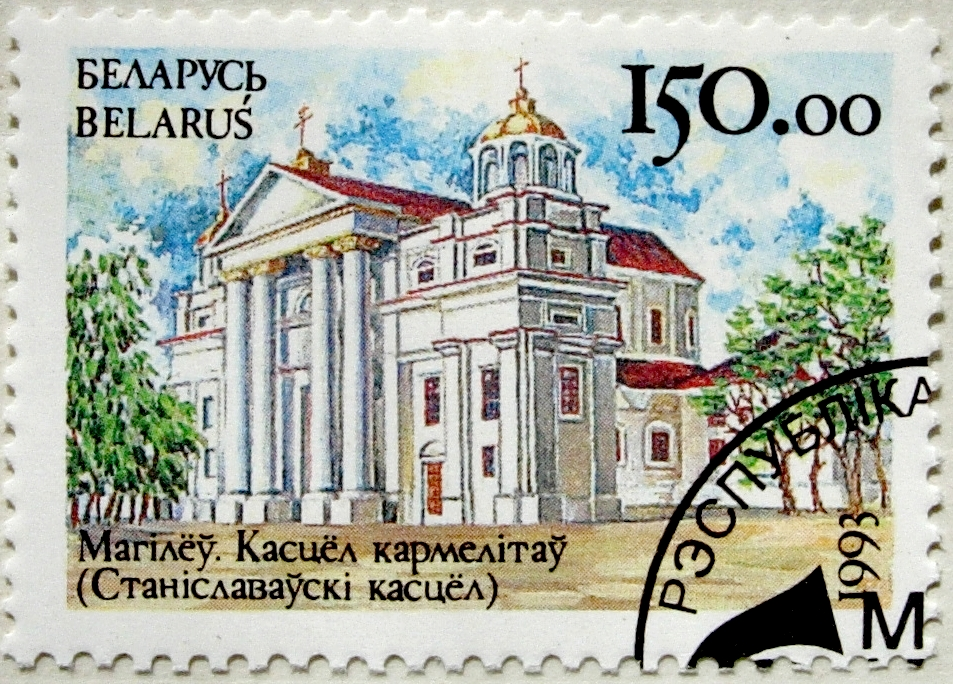 Марка. Республика Беларусь. 1993 г. Кармелитский костел св. Станислава в Могилеве.